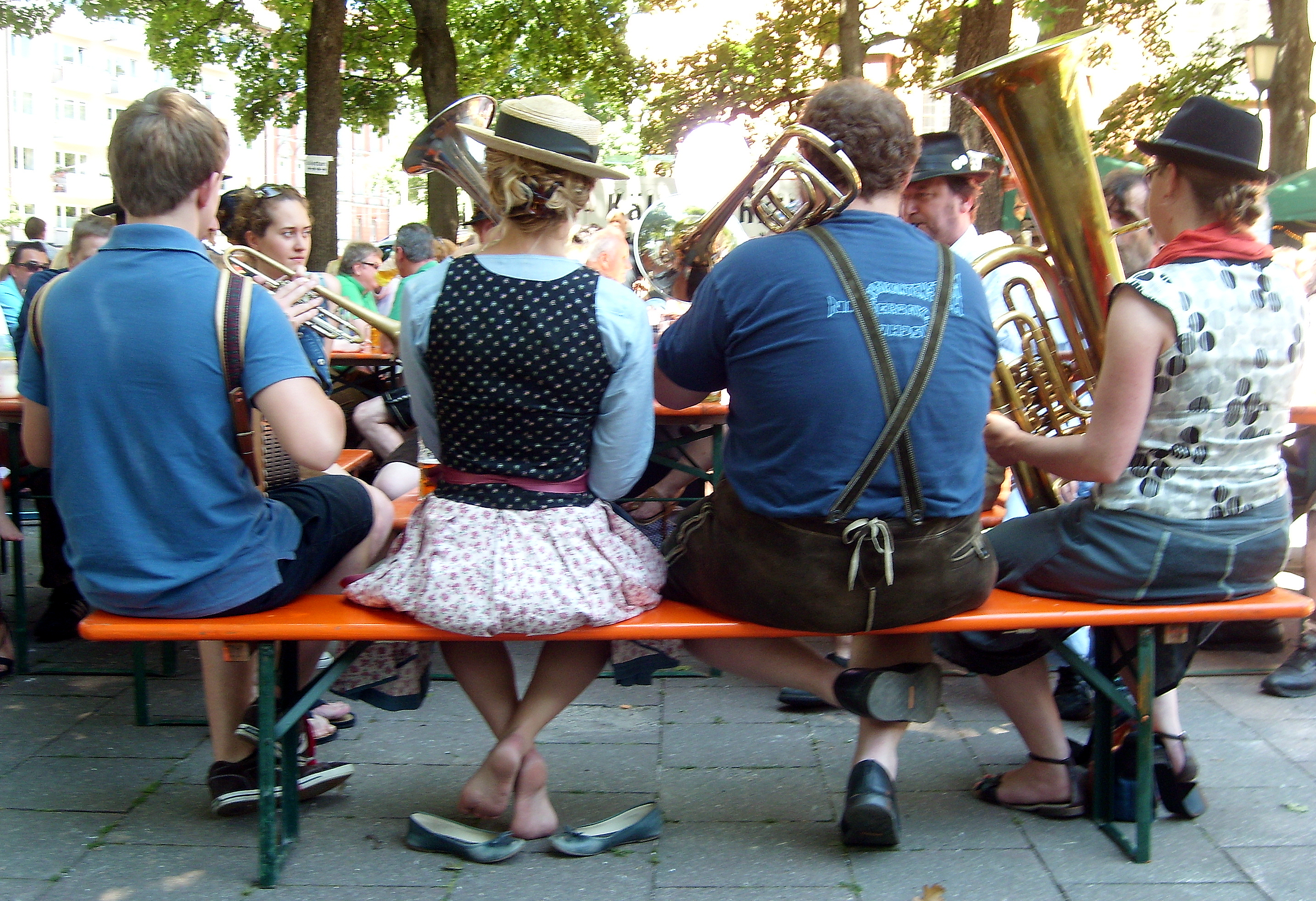 Blasmusik bei einem Münchner Stadtteilfest 2012